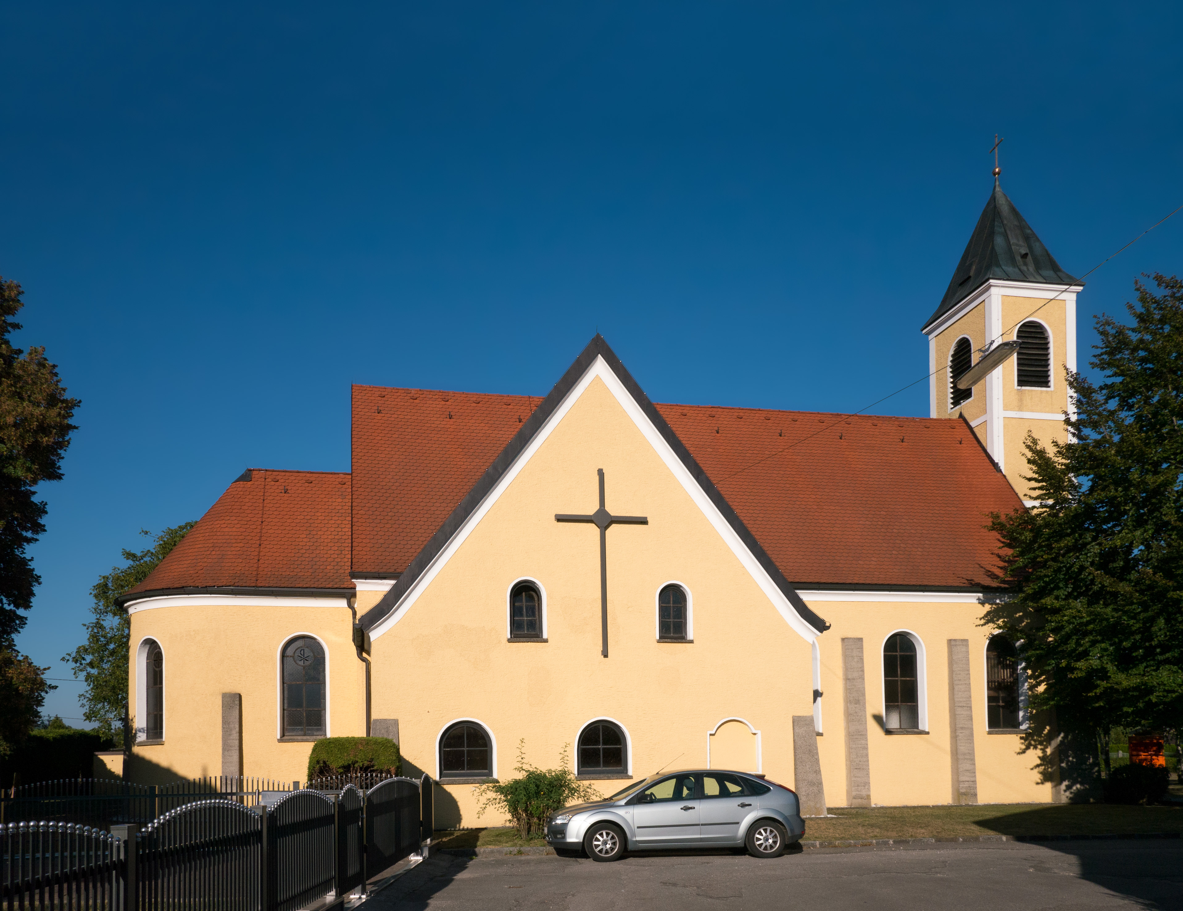 Kath. Pfarrkirche Maria Königin des Friedens und Pfarrzentrum